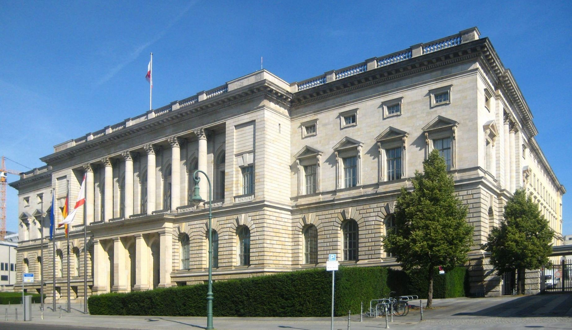 Das Berliner Abgeordnetenhaus in der Niederkirchnerstraße 5 in Berlin-Mitte, erbaut 1892-1897 als Preußisches Abgeordnetenhaus im Neorenaissance-Stil nach einem Entwurf des Architekten Friedrich Schulze. Der fast quadratische Bau besitzt vier Innenhöfe. Die Fassade an der Niederkirchnerstraße erinnert an italienische Stadtpalazzi. Das Gebäude wurde 1936 vom Architekten Ernst Sagebiel zum "Haus der Flieger" umgebaut und dem benachbarten Reichsluftfahrtministerium angegliedert. Nach dem Zweiten Weltkrieg saßen in dem Gebäude an der Sektorengrenze zunächst Teile der Sowjetischen Militäradministration, später verschiedene Behörden und Institutionen der DDR, so zunächst der Ministerrat, später Teile der Akademie der Wissenschaften. Seit dem Umbau durch die Architektengemeinschaft Rolf und Jan Rave, Walter Krüger und Marina Stankovic 1991-1993 dient das Gebäude als Berliner Abgeordnetenhaus. Es ist als Baudenkmal gelistet.